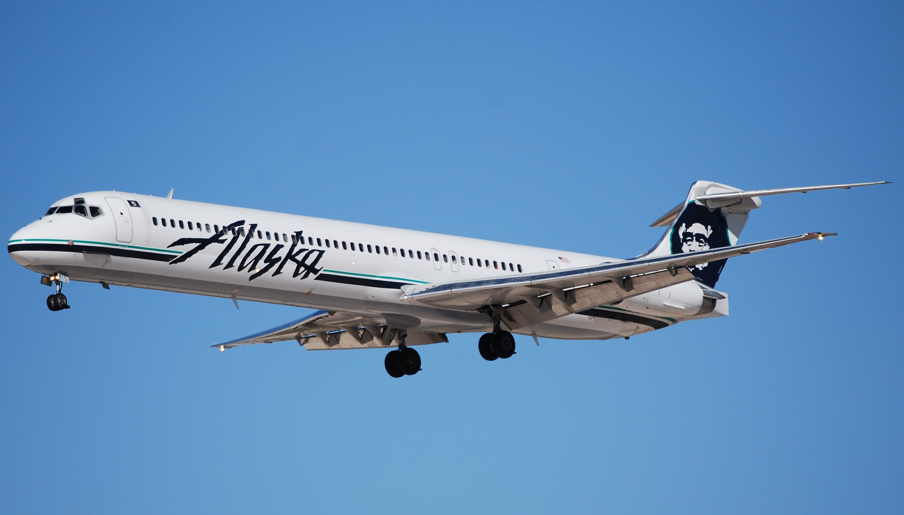 ALASKA MAD DOG